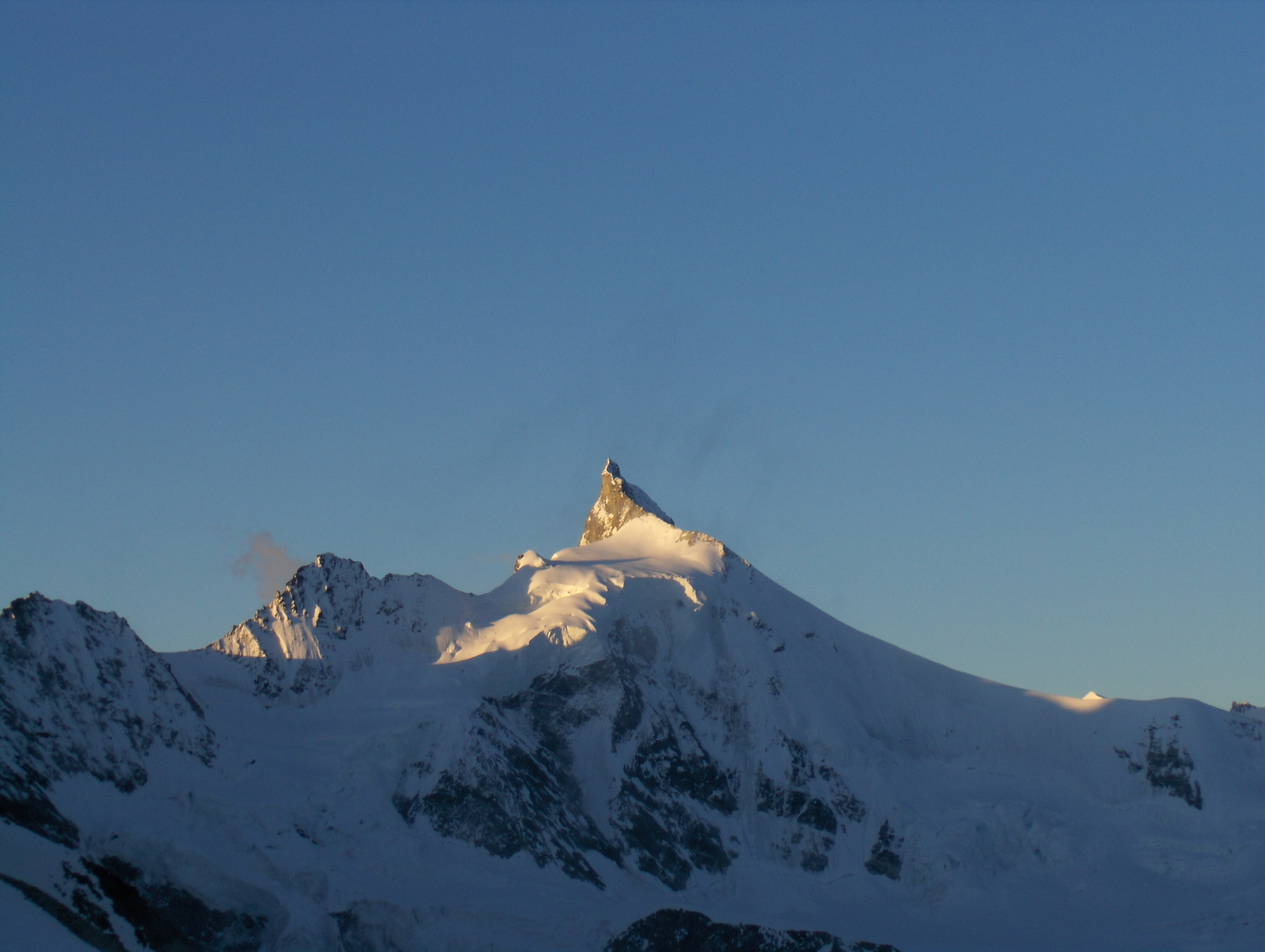 Zinalrothorn au lever du soleil, vu de la cabane de Tracuit